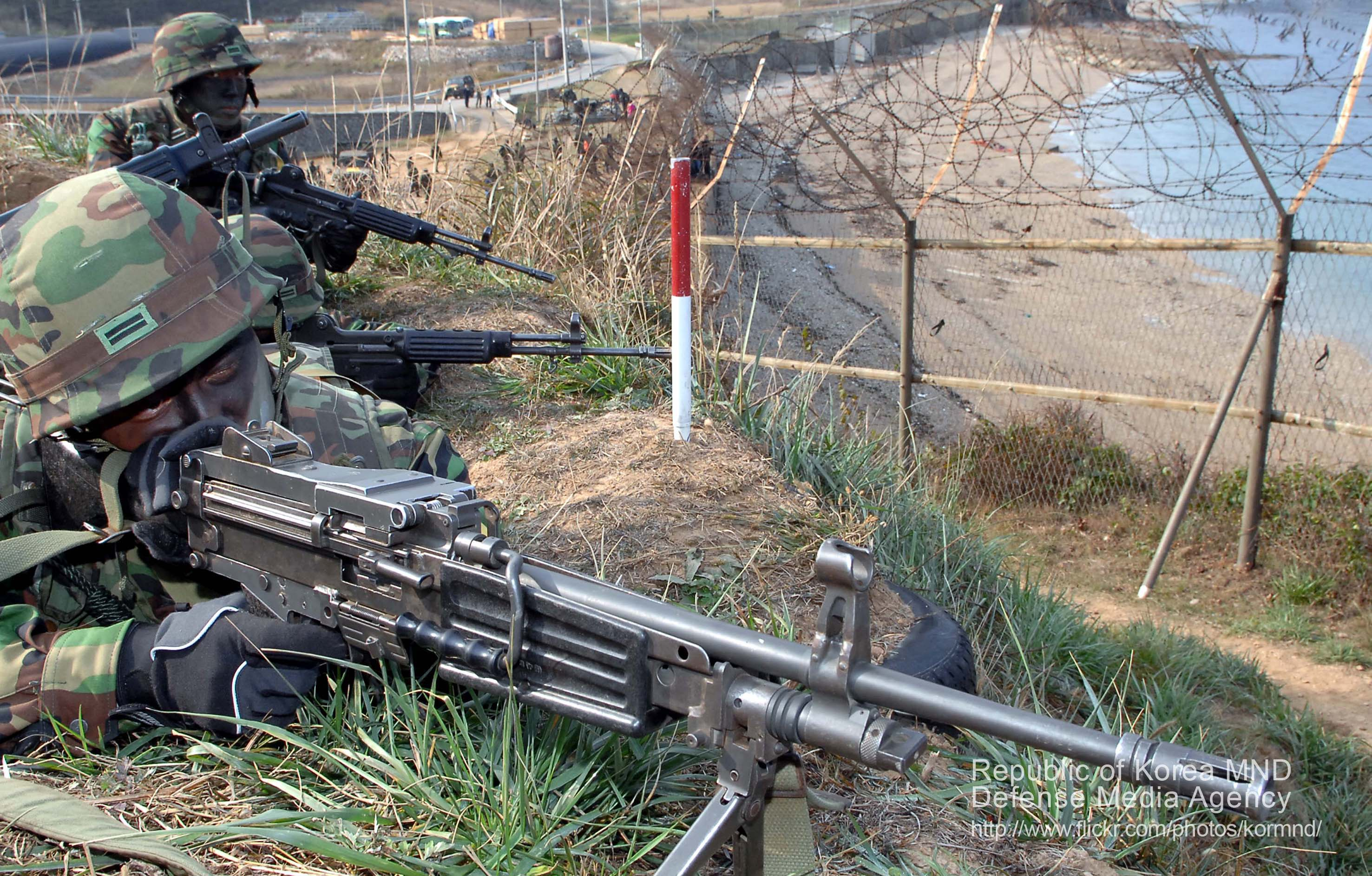 2011 국방화보 Rep. of Korea, Defense Photo Magazine 백령도에서 서북도서 방어훈련에 참가 중인 해병대원이 해 안 경계 임무를 수행하고 있